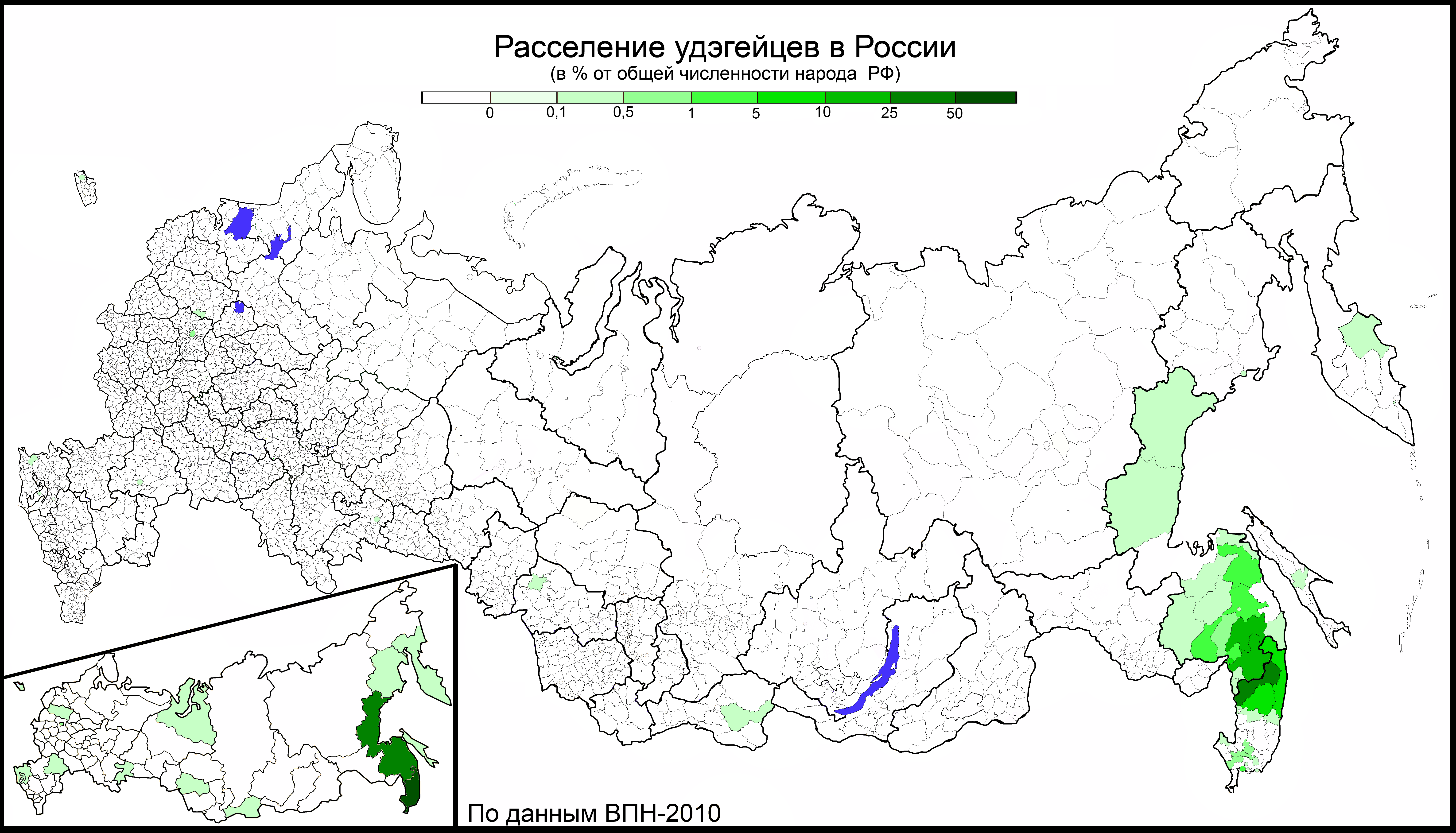 Расселение удэгейцев в России по муниципальным районам и городским округам в % от общей численности этого народа в РФ. По переписи 2010 года